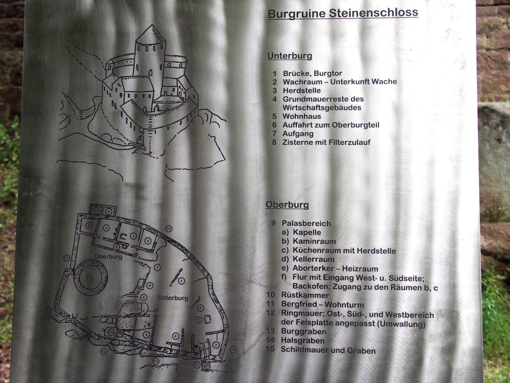 Steinenschloss, Fotografie der frei zugänglichen Infotafel an der Ruine Datum: 29.5.2005 Fotograf: Peter Schmenger